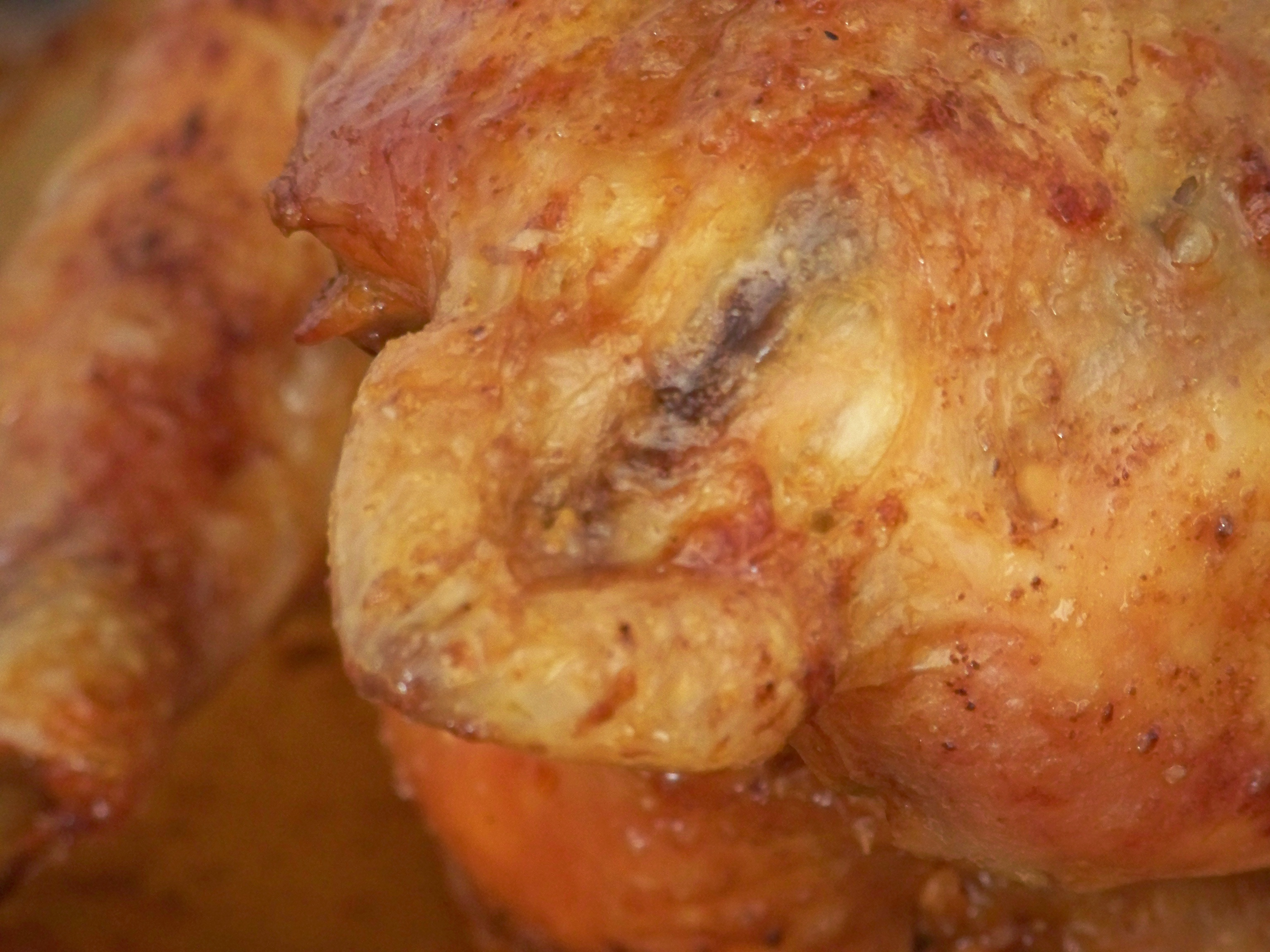 Sot-l'y-laisse, gros plan du croupion du poulet rôti